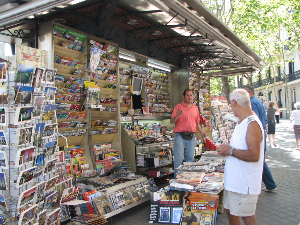 Madrid.